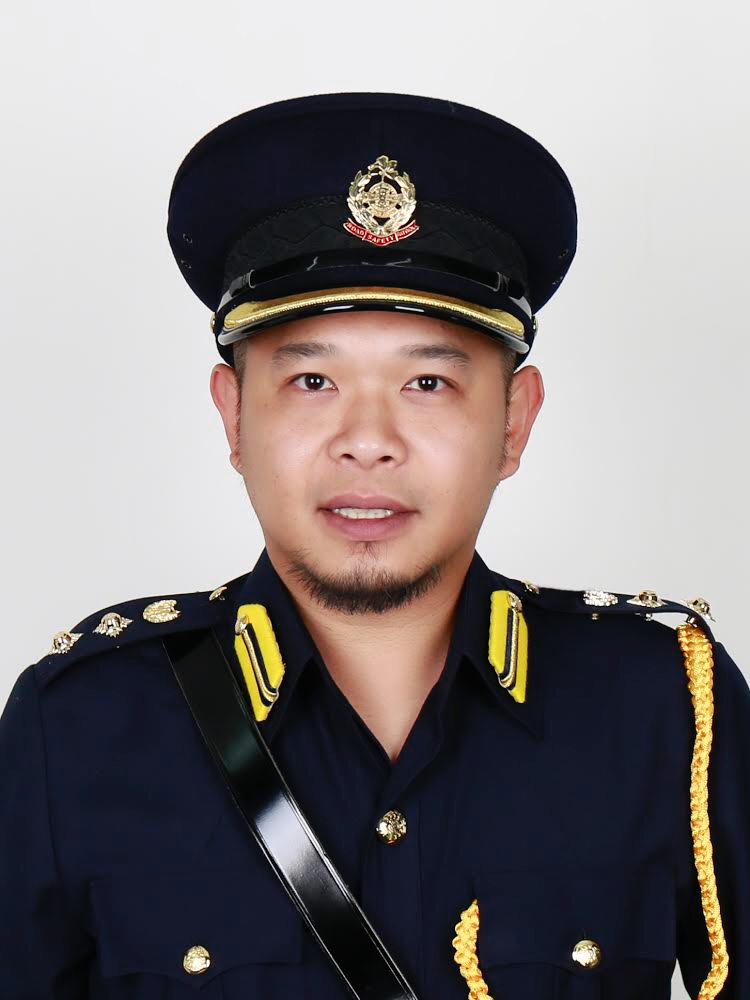 中文（香港）: 香港交通安全隊 推廣及宣傳署 總隊監 凌國龍